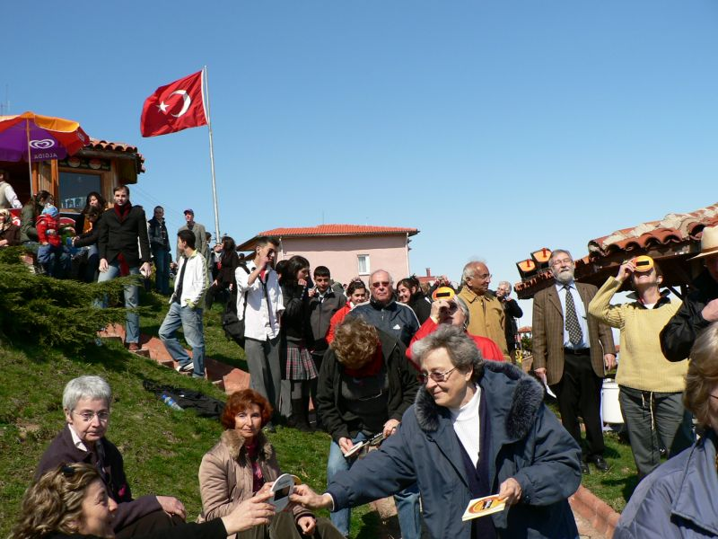 Eclipse de soleil à Ordu, en turquie. 12h57, à 9 minutes de la totale. La lunmière a déjà baissé